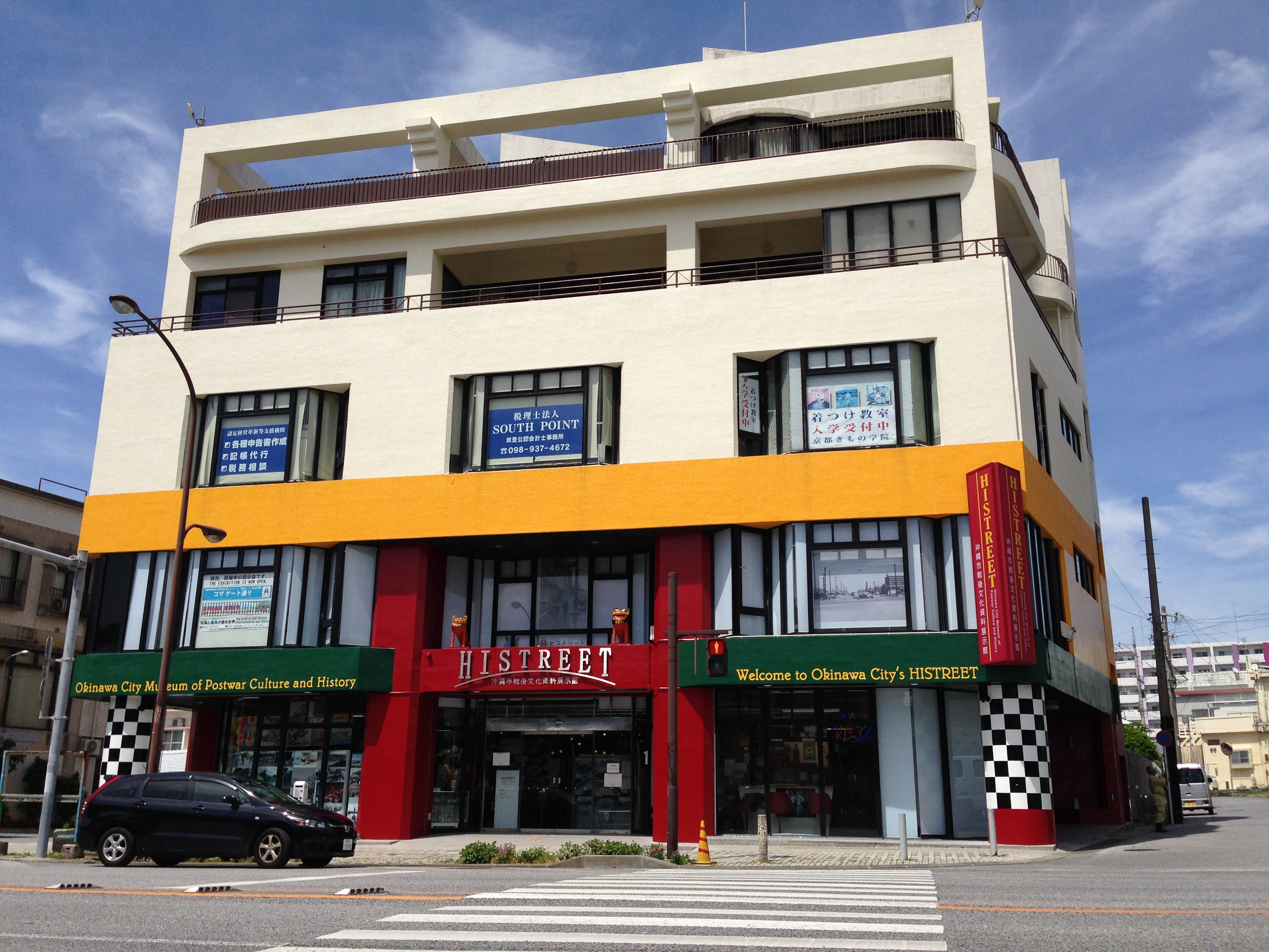 new histreet